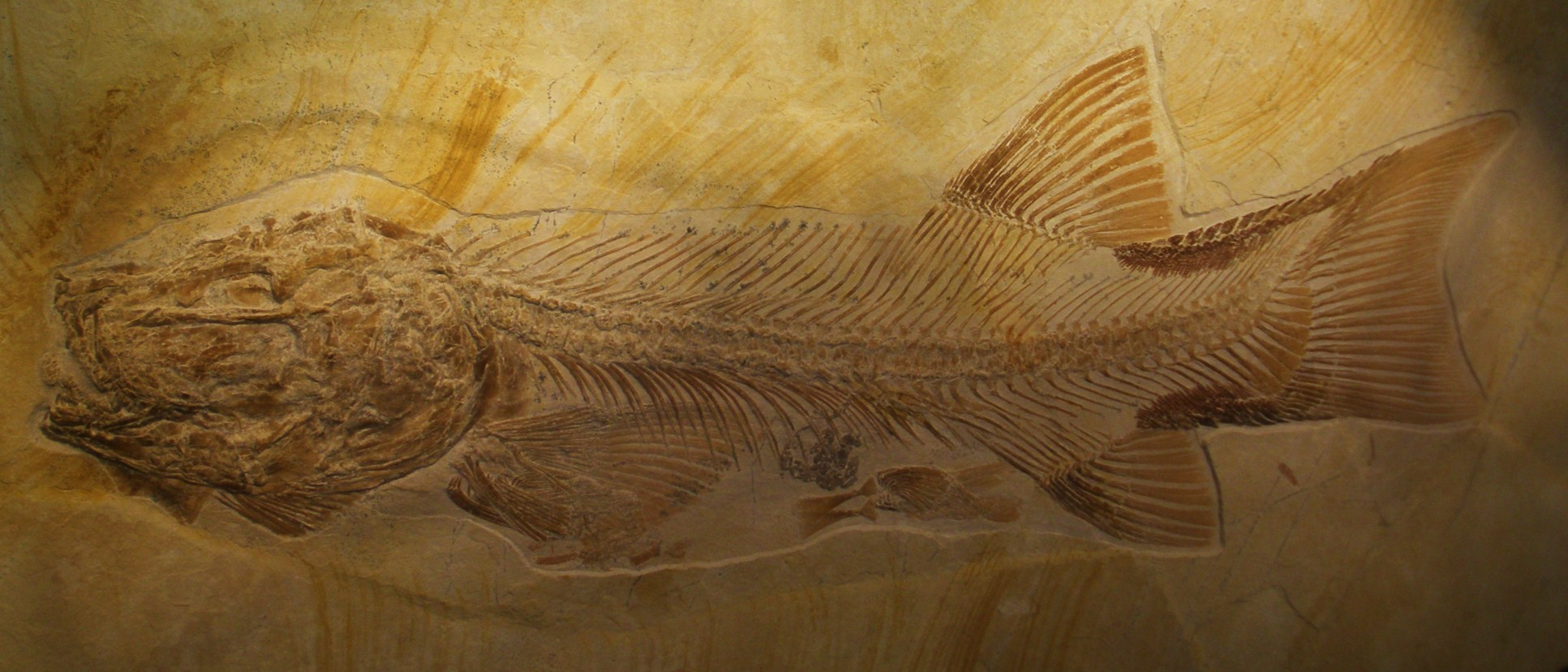 Fossil of Callopterus, an extinct fish- Took the photo at Fossil Show, Munich